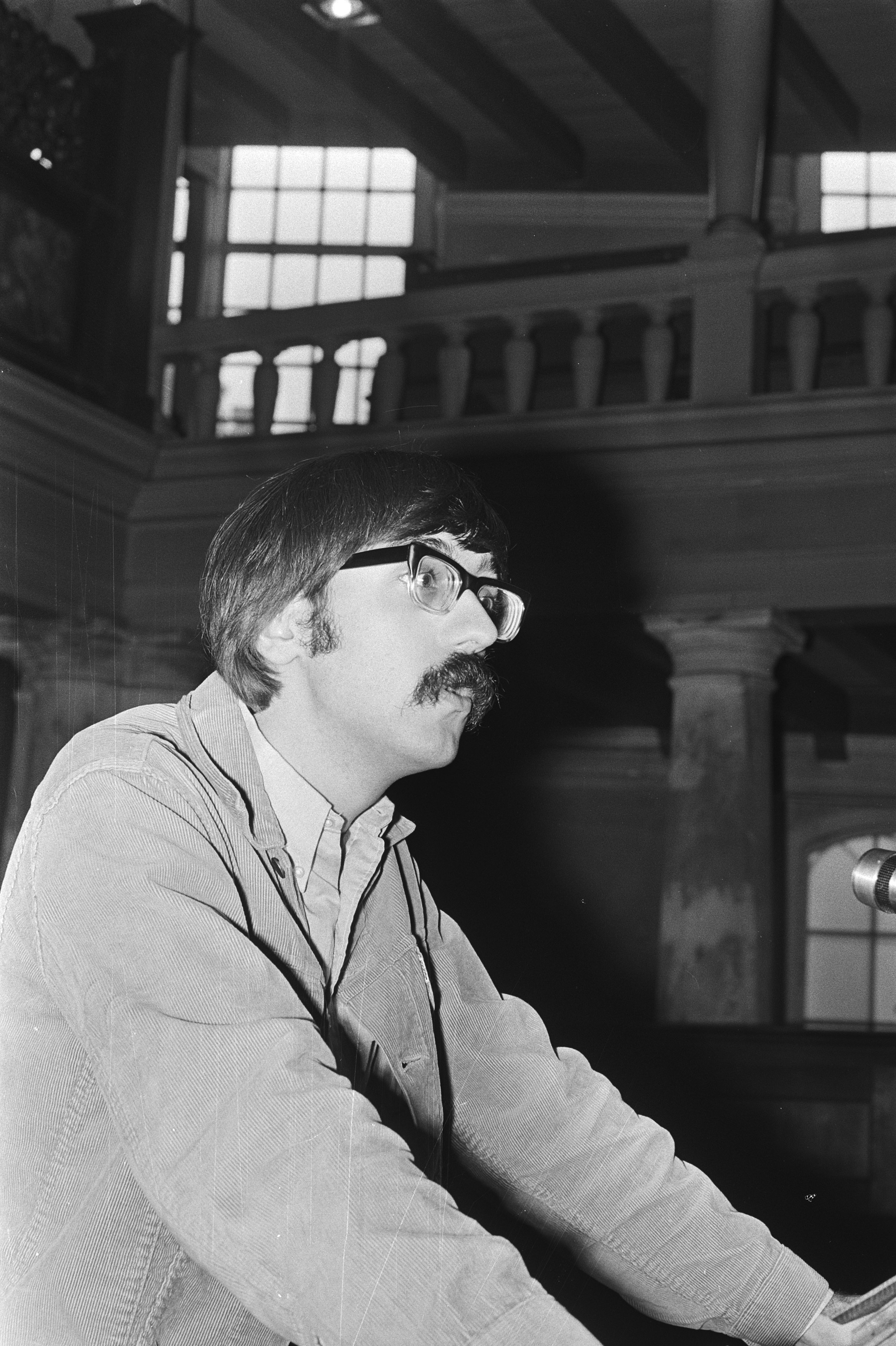 Collectie / Archief : Fotocollectie Anefo Reportage / Serie : Reina Prinsen Geerligsprijs 1970 Beschrijving : Dichter Arie van der Berg ontvangt Reina Prinsen Geerligsprijs in de Aula van Universiteit Amsterdam; de prijswinnaar leest uit eigen werk Datum : 24 november 1970 Locatie : Amsterdam, Noord-Holland Trefwoorden : dichters, literatuur, poezie, prijsuitreikingen, schrijvers Persoonsnaam : Berg, Arie van der Fotograaf : Fotograaf Onbekend / Anefo Auteursrechthebbende : Nationaal Archief Materiaalsoort : Negatief (zwart/wit) Nummer archiefinventaris : bekijk toegang 2.24.01.05 Bestanddeelnummer : 924-0373